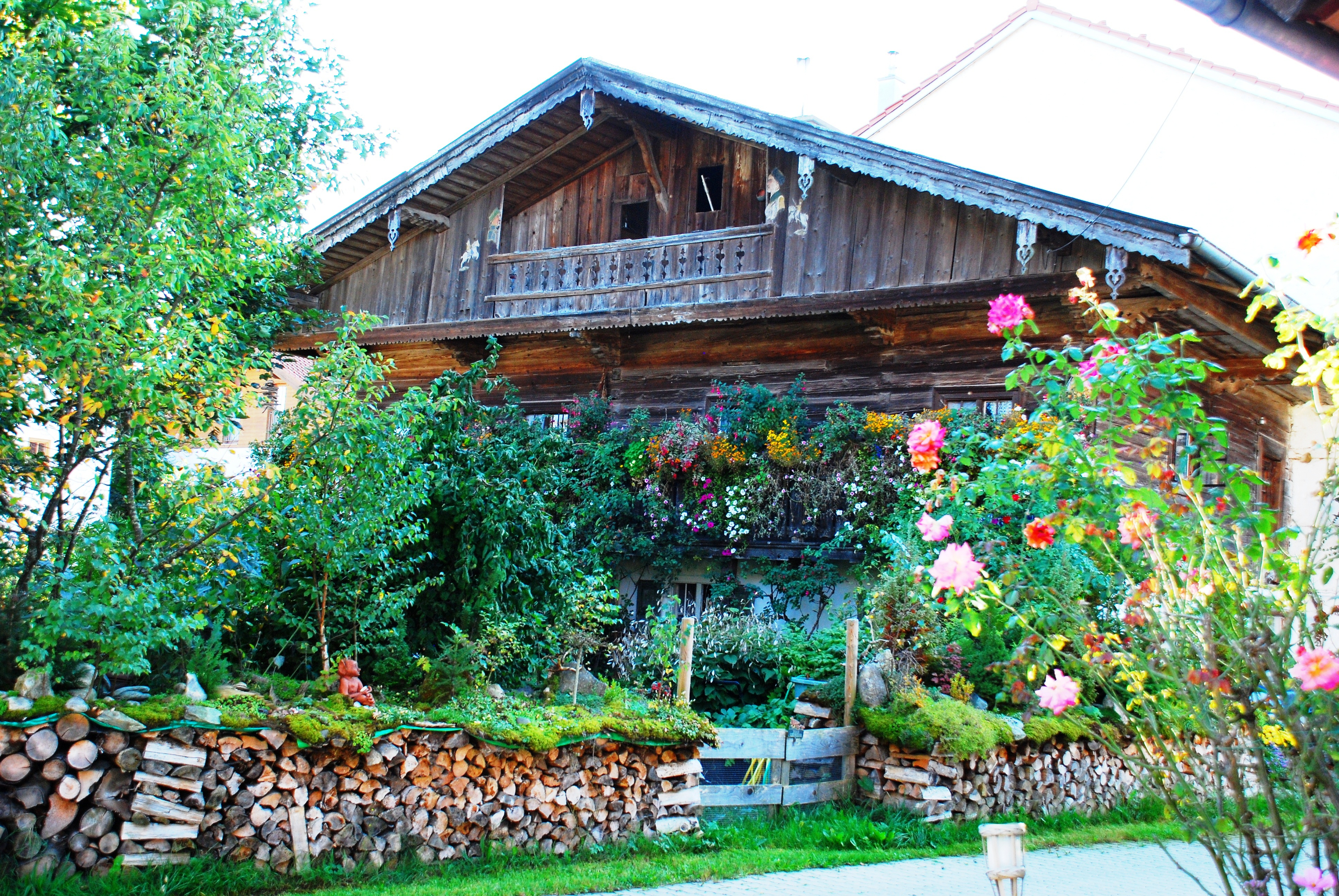 Bauernhaus in der Schäfflerstraße 12 in Aying, Landkreis München, Regierungsbezirk Oberbayern, Bayern. Als Baudenkmal in der Bayerischen Denkmalliste aufgeführt. Foto gemäß den Voraussetzungen zur Panoramafreiheit von öffentlicher Verkehrsfläche aus aufgenommen.